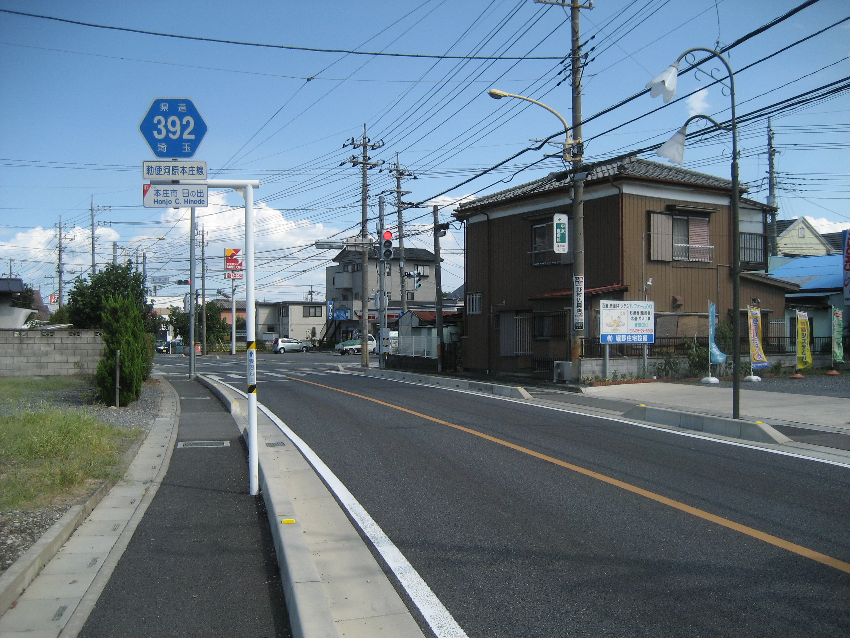 埼玉県道258号線本庄市日の出